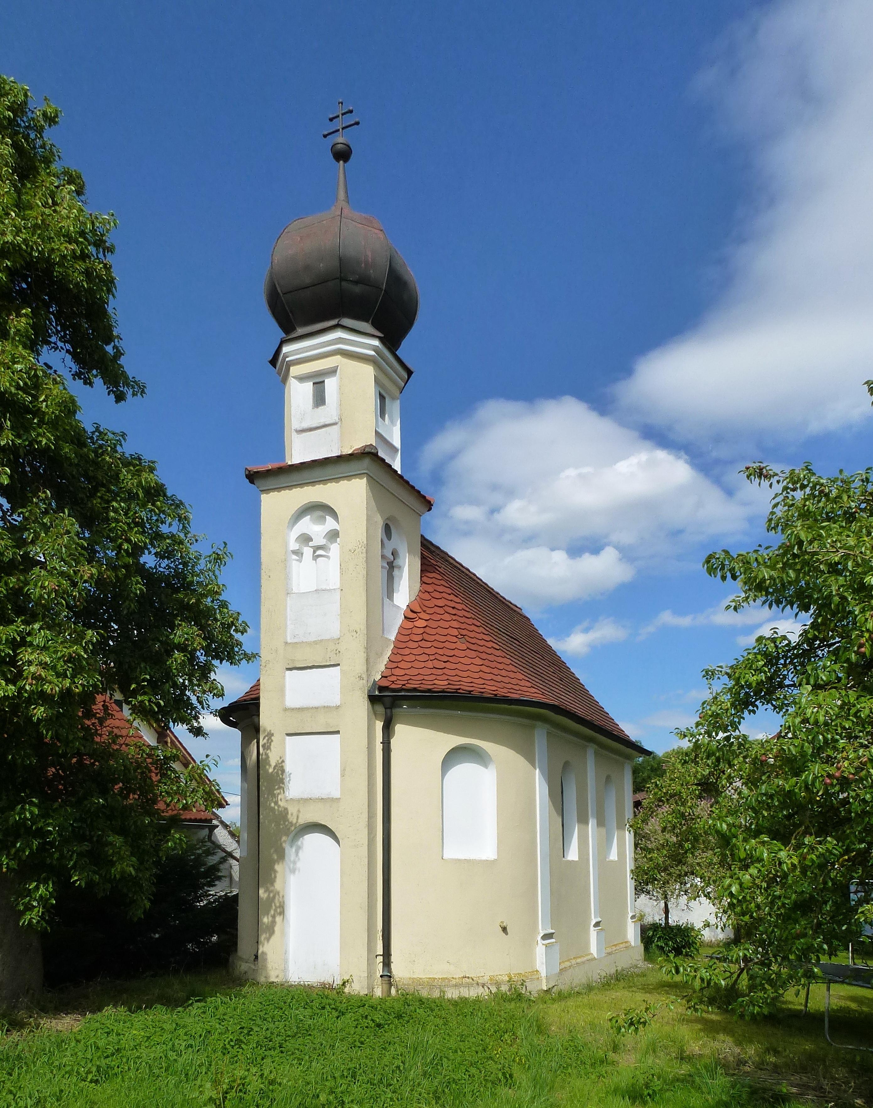 Weitenried, bei Anwesen Weitenried 5: Kapelle Hl. Familie, Ansicht von WNW